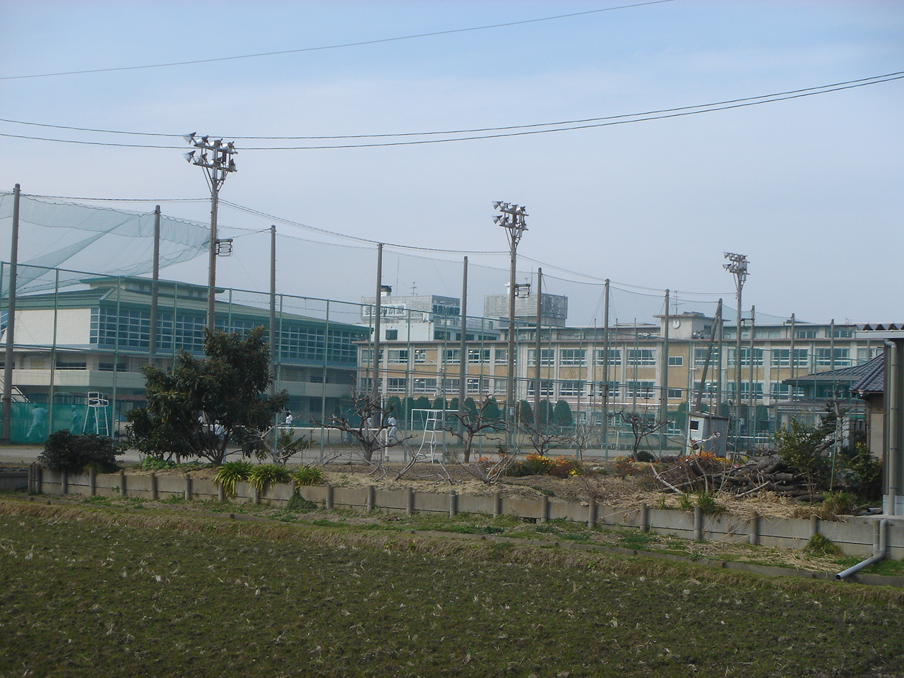 Hashima_High school（岐阜県立羽島高等学校）,Hashima,Gifu,Japan(岐阜県羽島市)で撮影